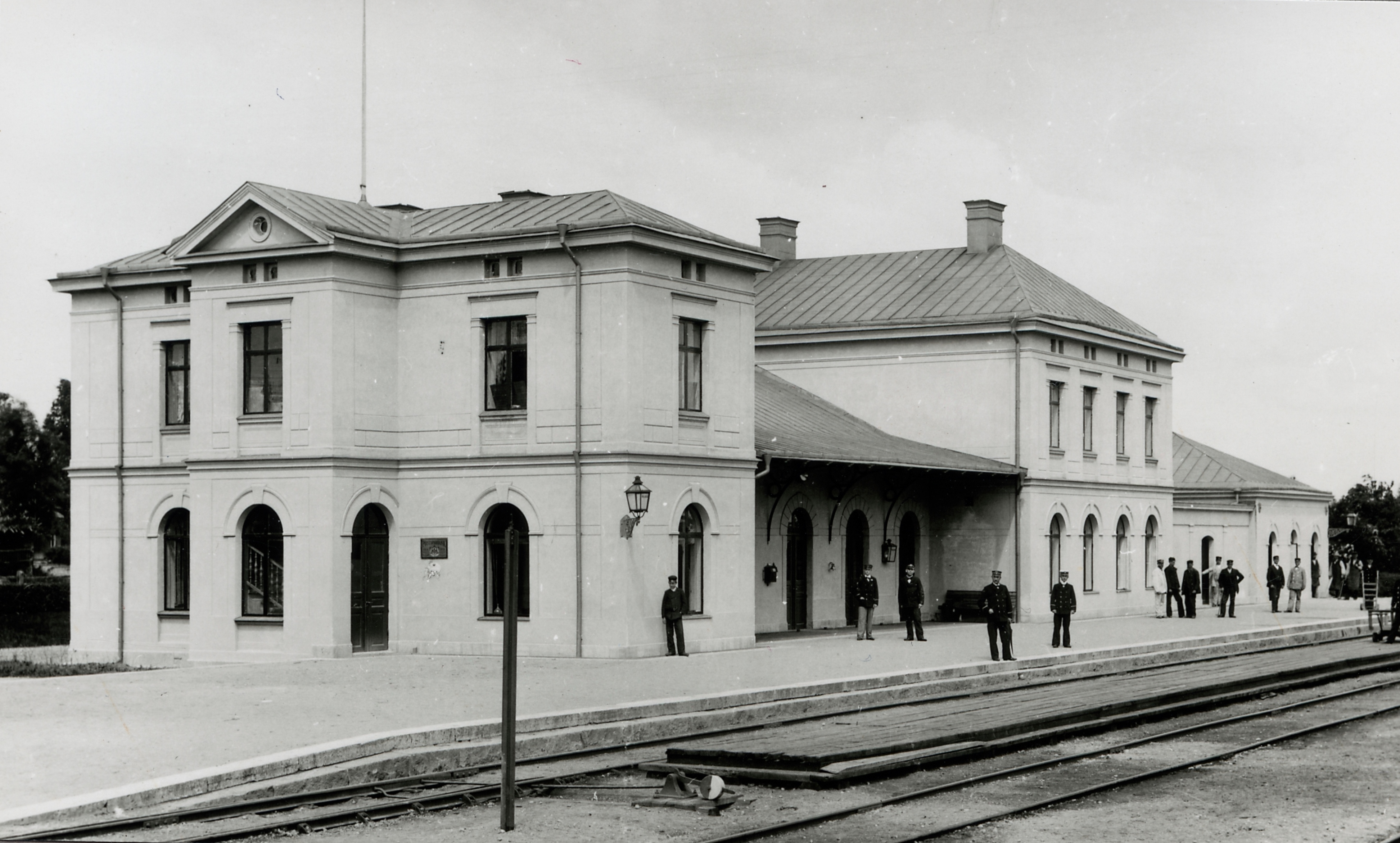 Valskog station